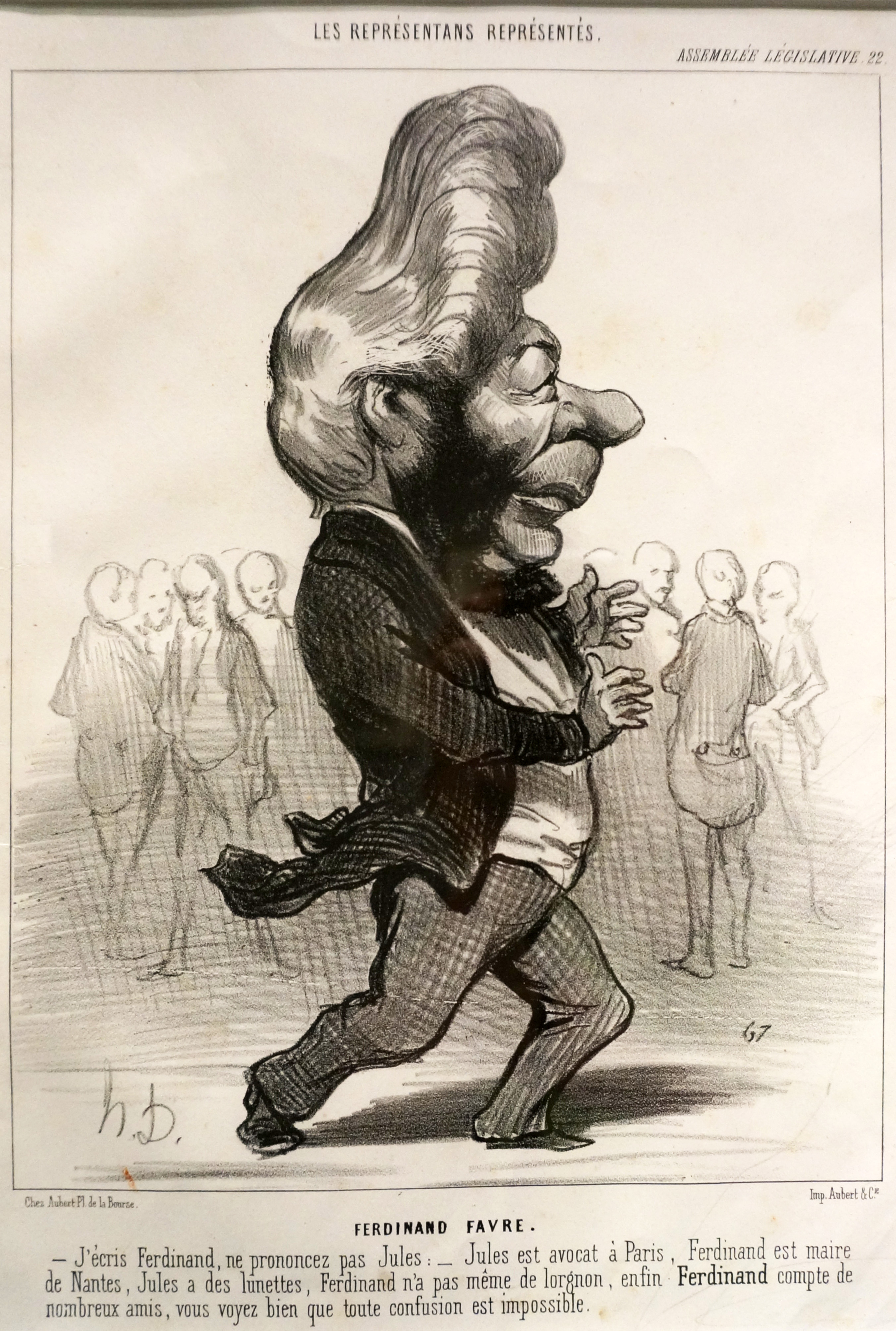 présenté lors de l'Exposition Daumier, Musée de la Franc-Maçonnerie.